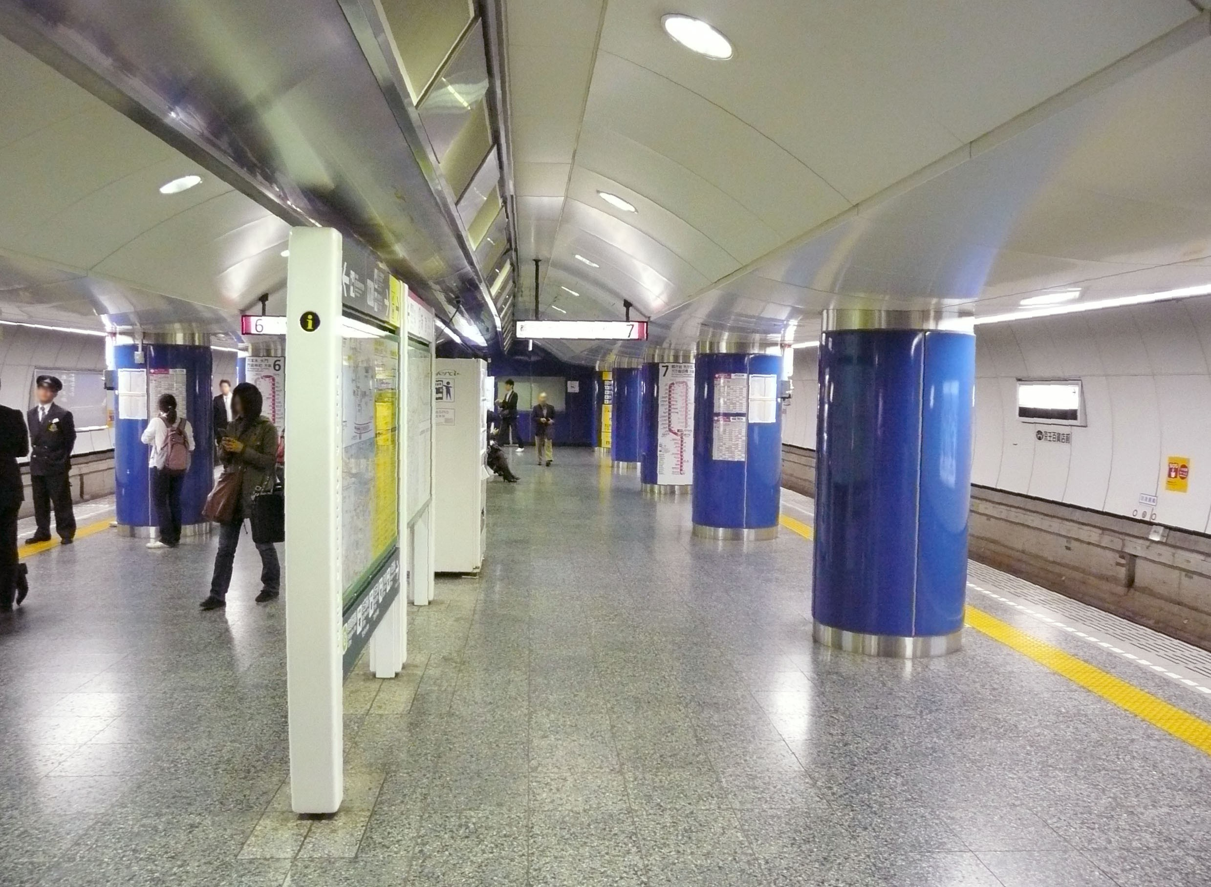 新宿駅大江戸線ホーム